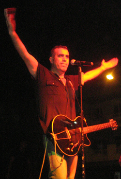 Zanger Haluk Levent